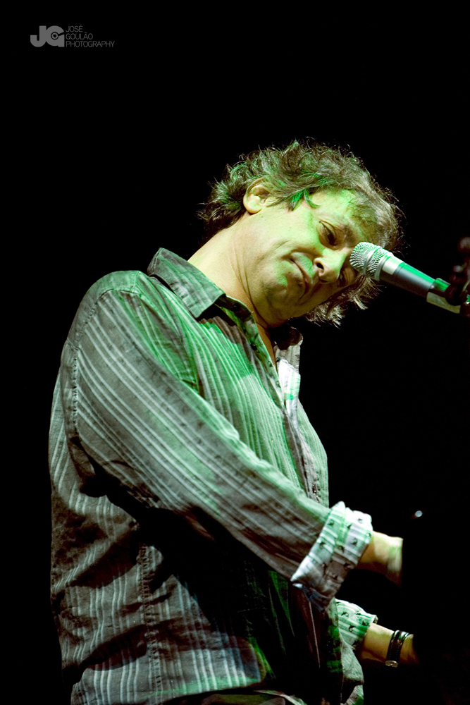 Jorge Palma no Coliseu dos Recreios